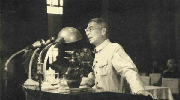 郭永懷在中國科學技術大學作學術報告。